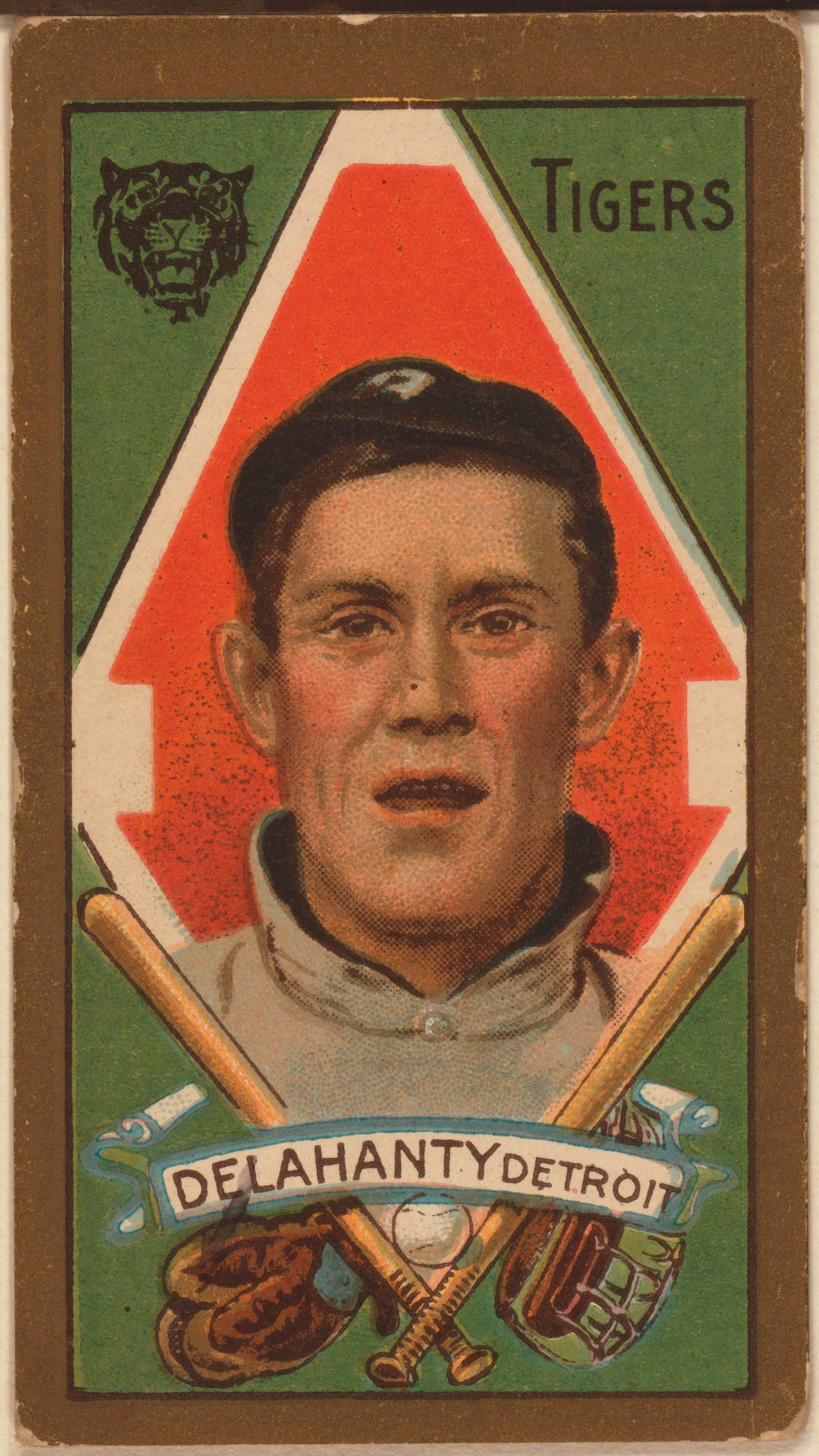 James Delahanty